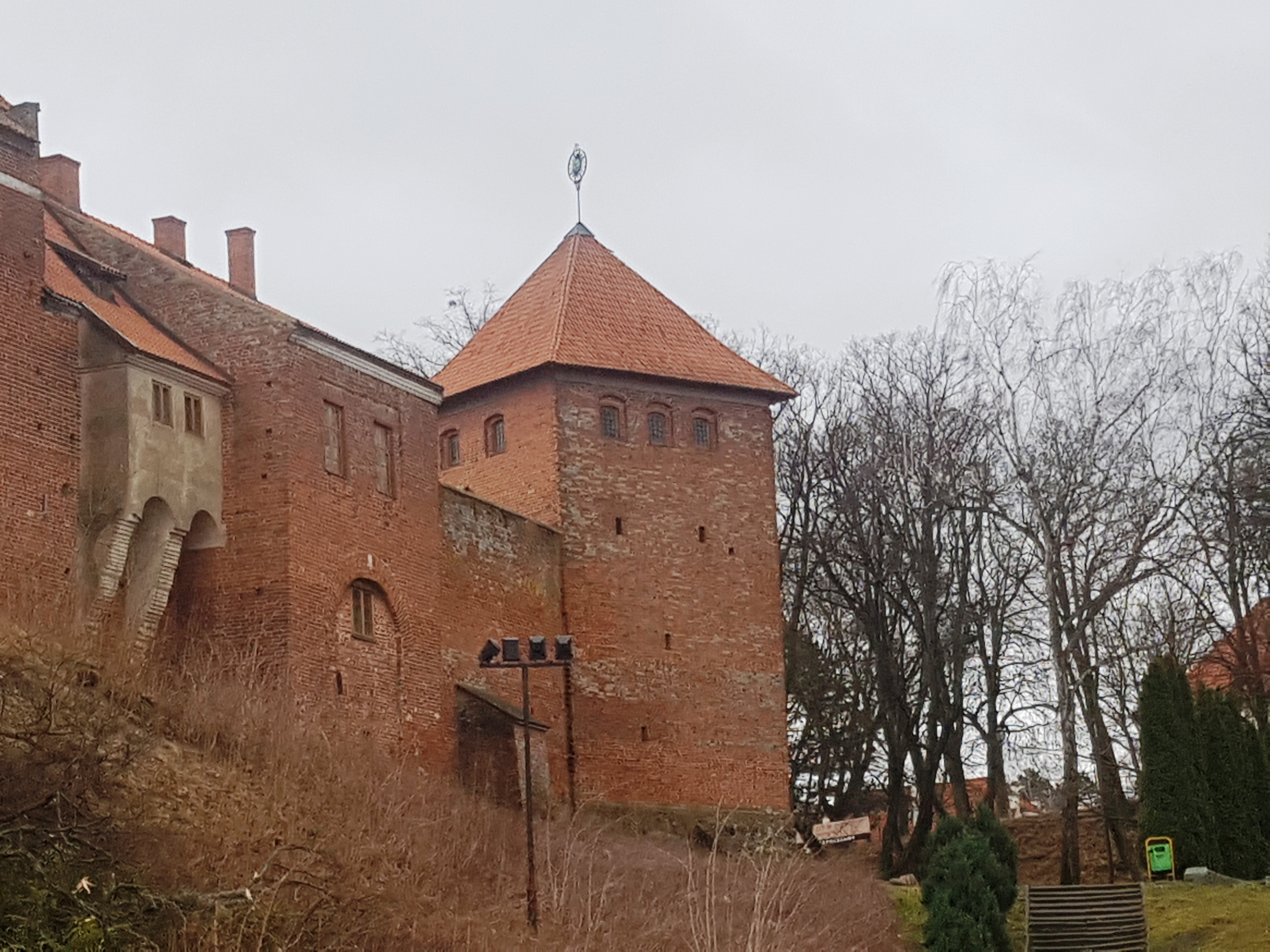 Wieża Kopernika Frombork